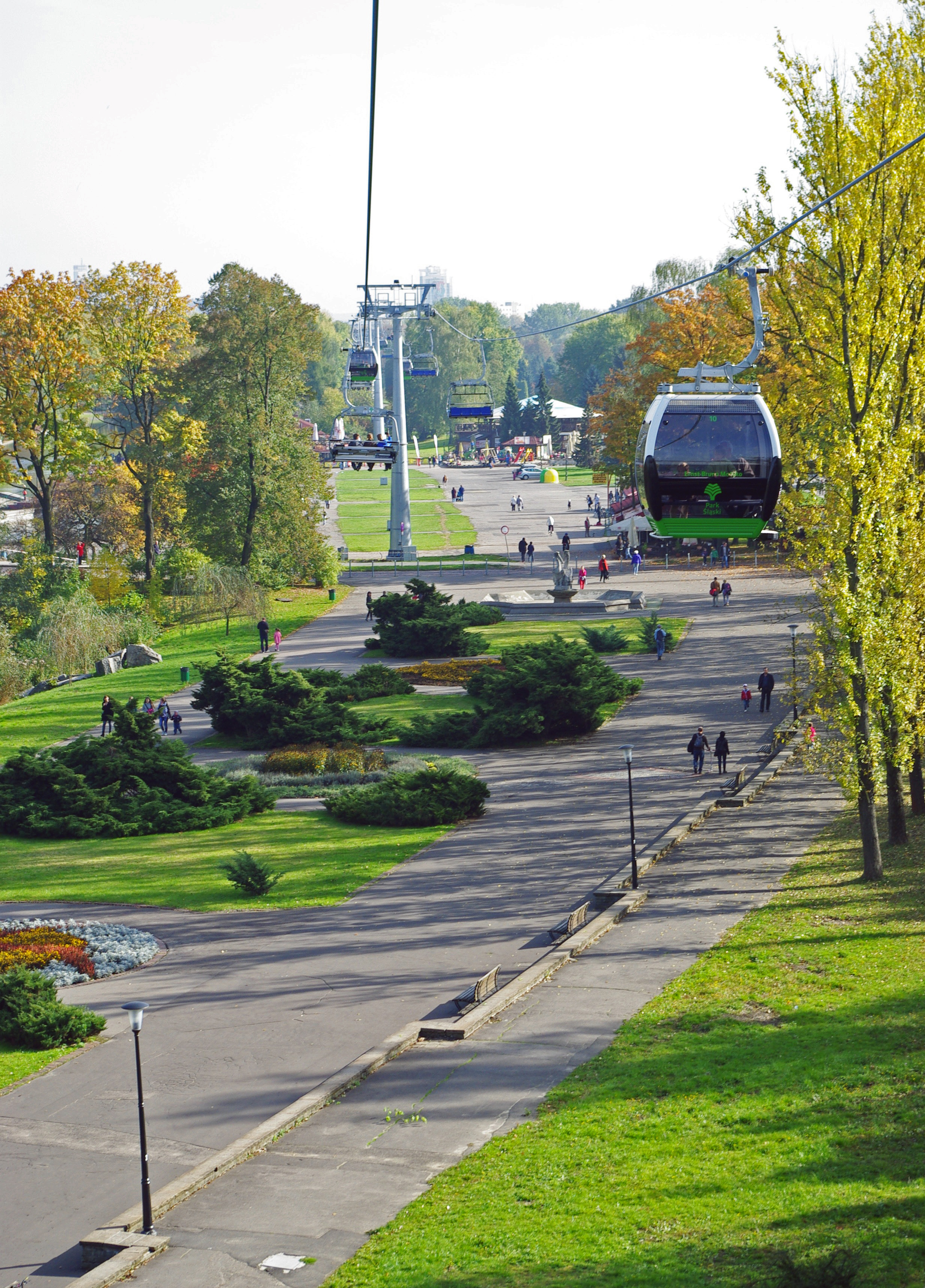 Kolejka linowa Elka